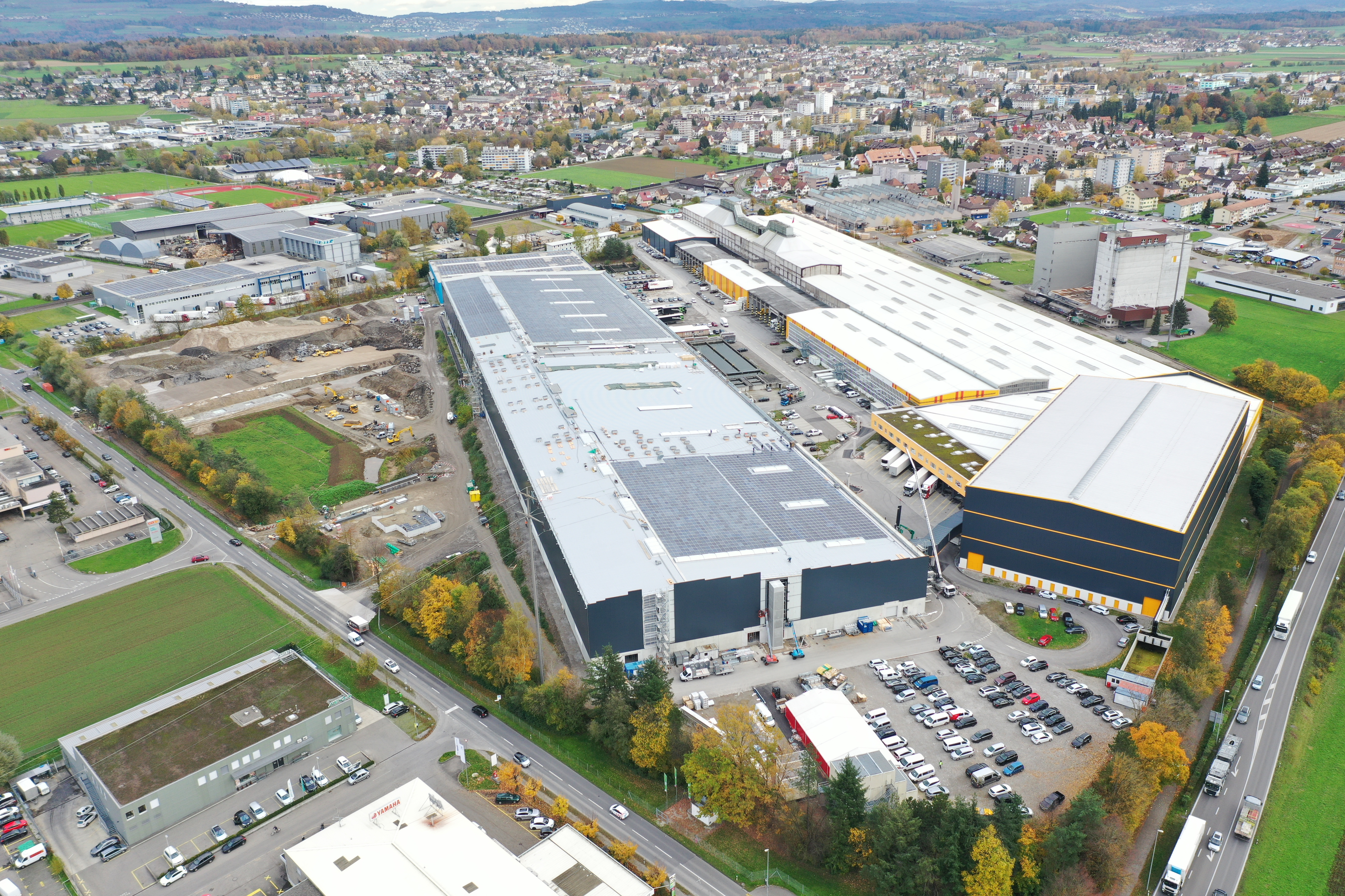 Industriepark Ferrowohlen AG